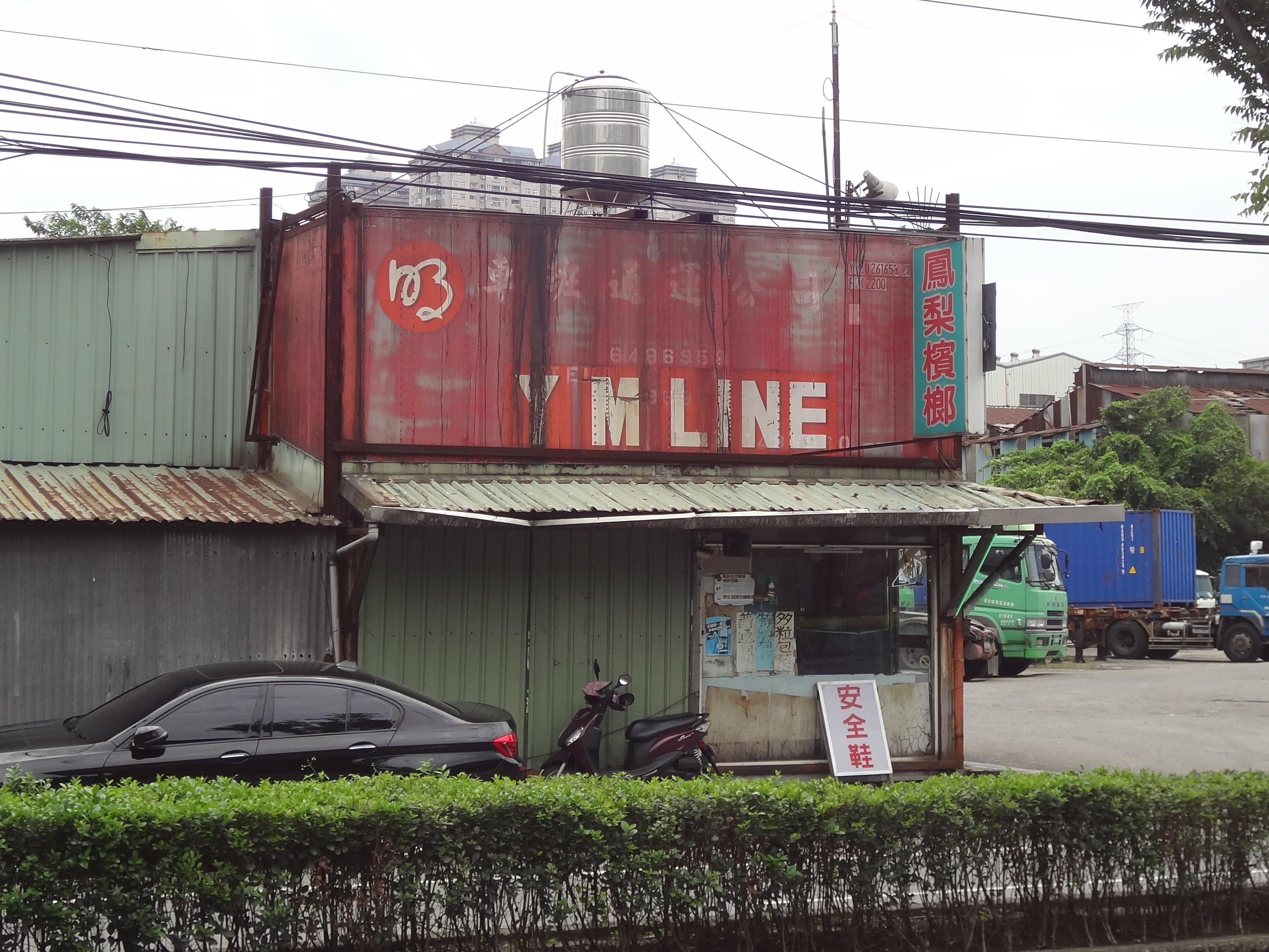 中文（台灣）: 鳳梨檳榔，位於新北市汐止區大同路三段，使用陽明海運廢棄貨櫃。